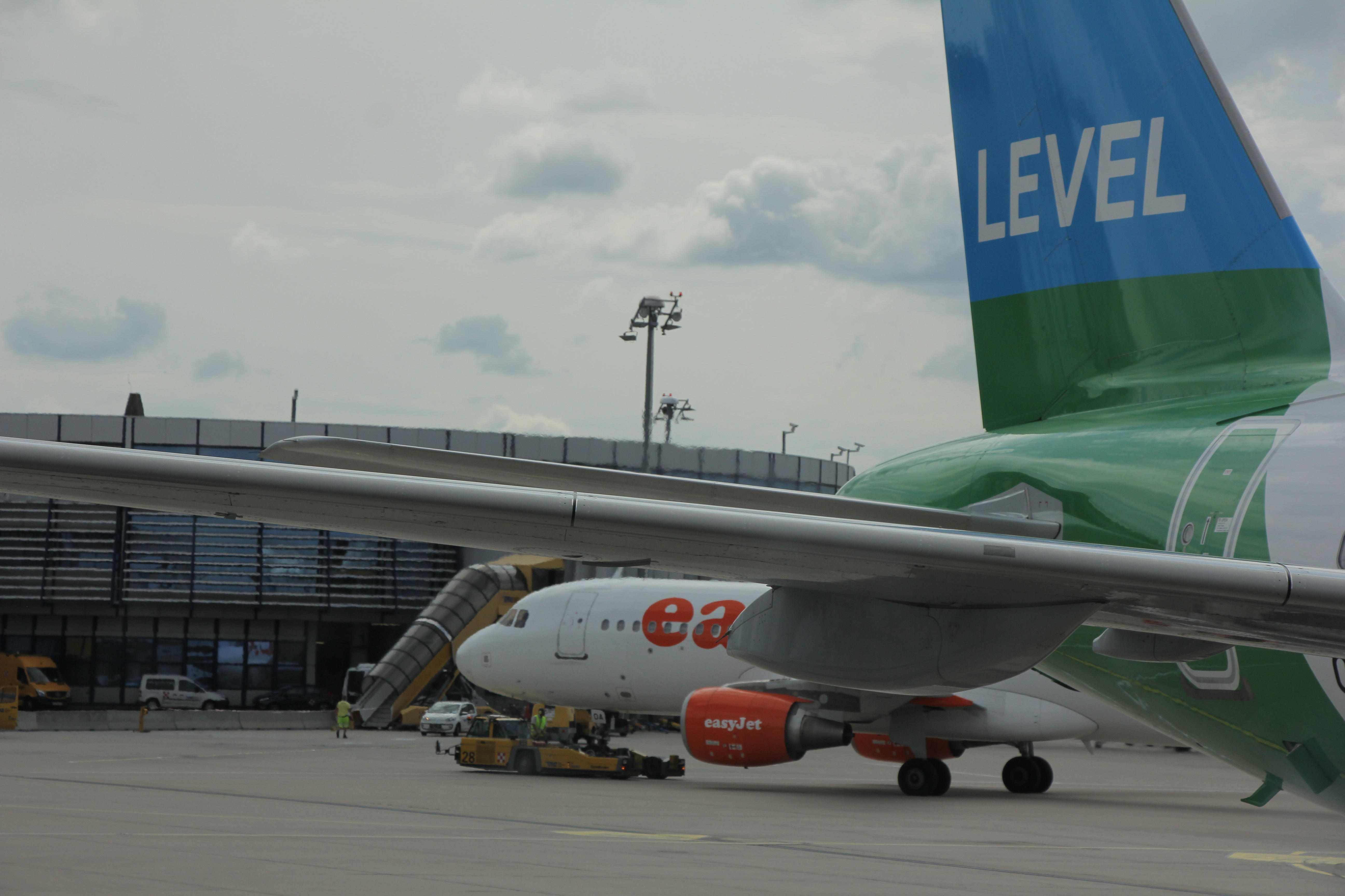 Heck einer Level-Maschine vom Vienna Airport vom Rollfeld aus gesehen